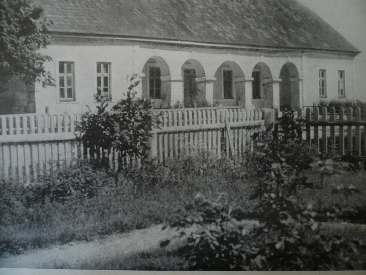 Ninasi postijaam